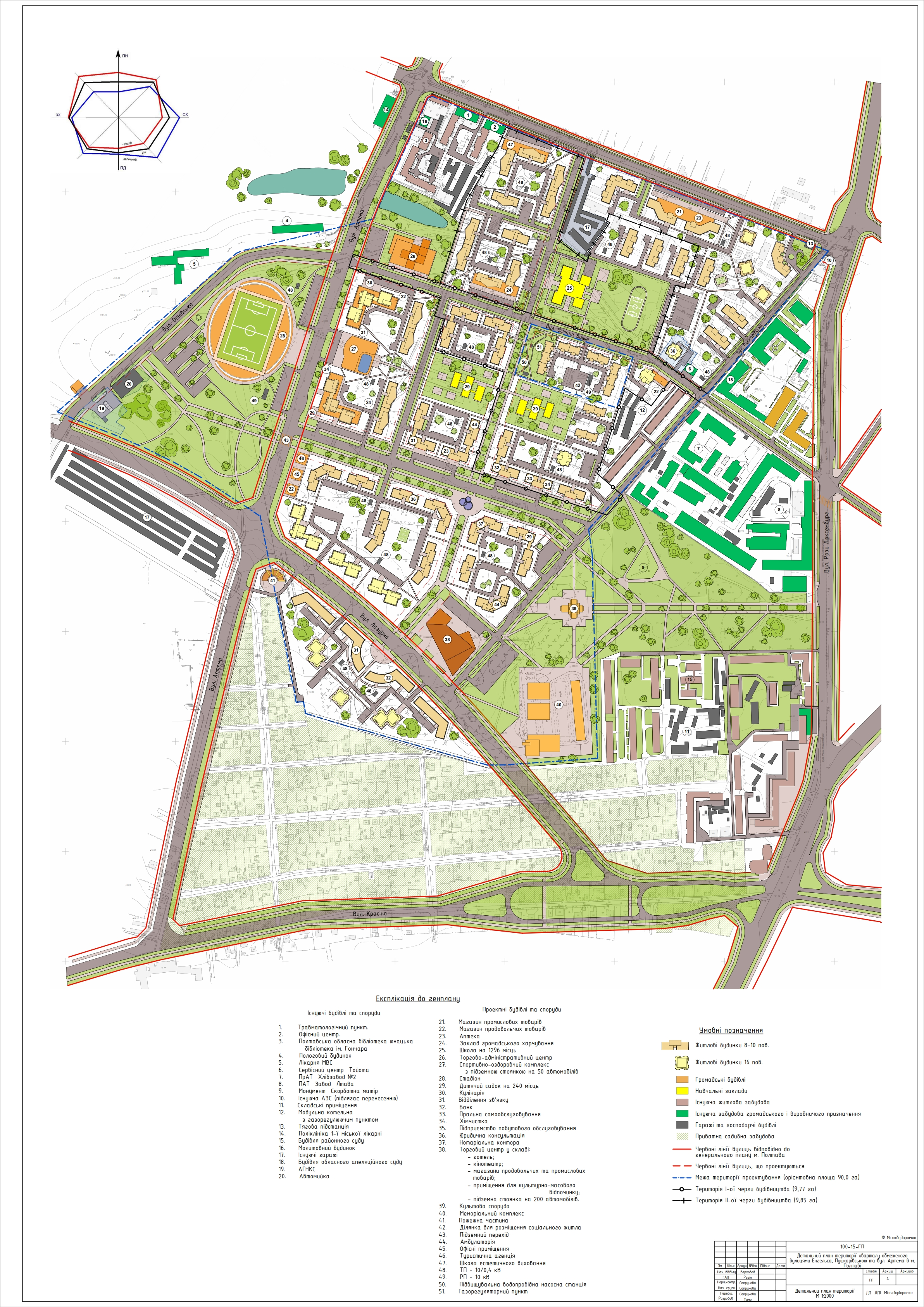 ДПТ артилерійські склади